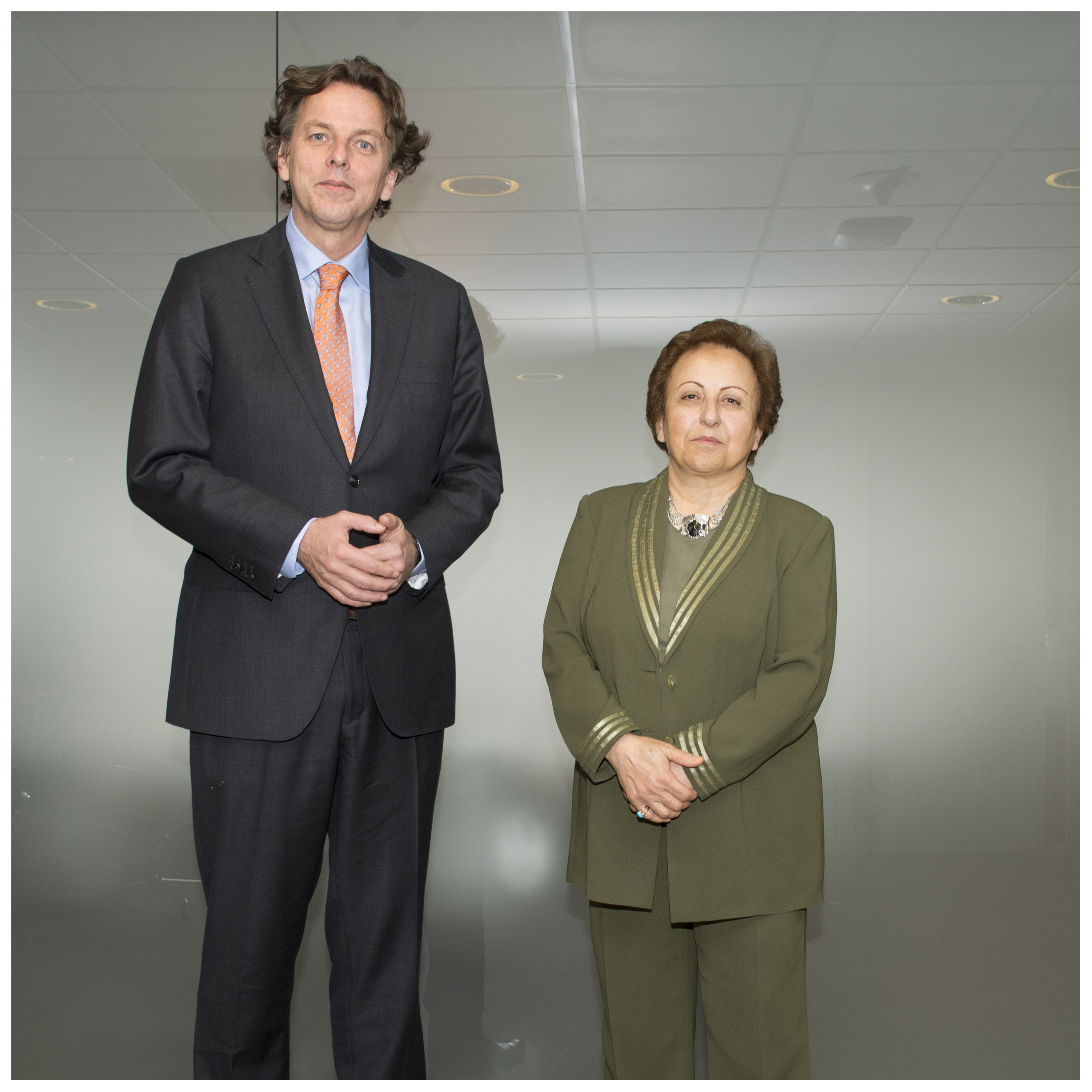 Foto's BZ | Aad Meijer Minister Koenders ontving de Iraanse juriste en mensenrechtenverdedigster Shirin Ebadi. In 2003 werd haar de Nobelprijs voor de Vrede toegekend voor haar strijd voor de rechten van vrouwen en kinderen in Iran. Persbericht: Koenders en Iraanse Nobelprijswinnares Ebadi: ban geweld tegen vrouwen uit Minister Bert Koenders van Buitenlandse Zaken overlegde dinsdag met de Iraanse Nobelprijswinnares Shirin Ebadi. Het gesprek had plaats op de internationale dag voor het uitbannen van geweld tegen vrouwen [link foto twitter]. Koenders en Ebadi spraken samen over hun zorgen over toenemend geweld tegen vrouwen en meisjes in het Midden-Oosten. ‘Steeds vaker kampen vrouwen met schendingen van hun rechten. Dit is een wereldwijd probleem’, aldus Koenders. Hij reflecteerde tijdens het gesprek op recente berichten over geweld tegen vrouwen in Syrië en Irak. ‘ISIS verkoopt, misbruikt, mishandelt en vermoordt vrouwen op barbaarse wijze’, zei Koenders na het gesprek. ‘Maar we moeten niet vergeten dat geweld tegen vrouwen overal voorkomt.’ شيرين عبادي مع بيرت كوندرز وزير الخارجية الهولندي